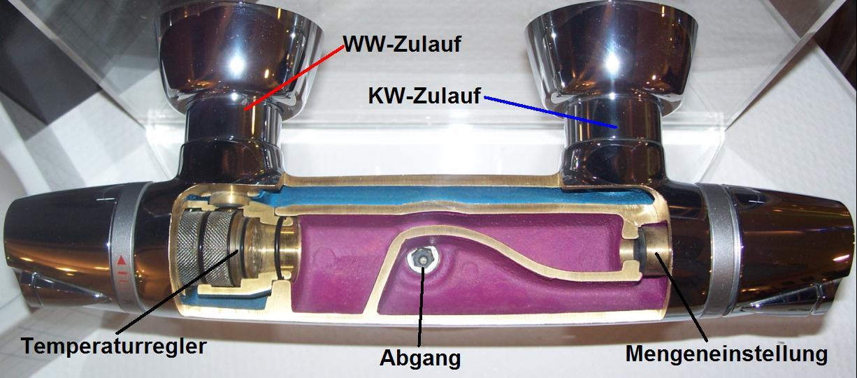 Thermostat-Duscharmatur der Fa. Grohe im Schnitt Beschriftung in Deutsch